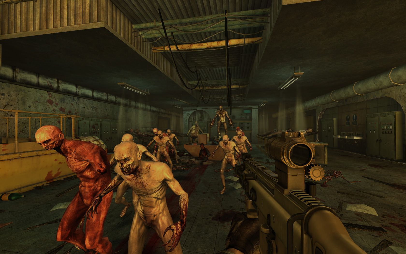 Action du jeu vidéo Killing Floor